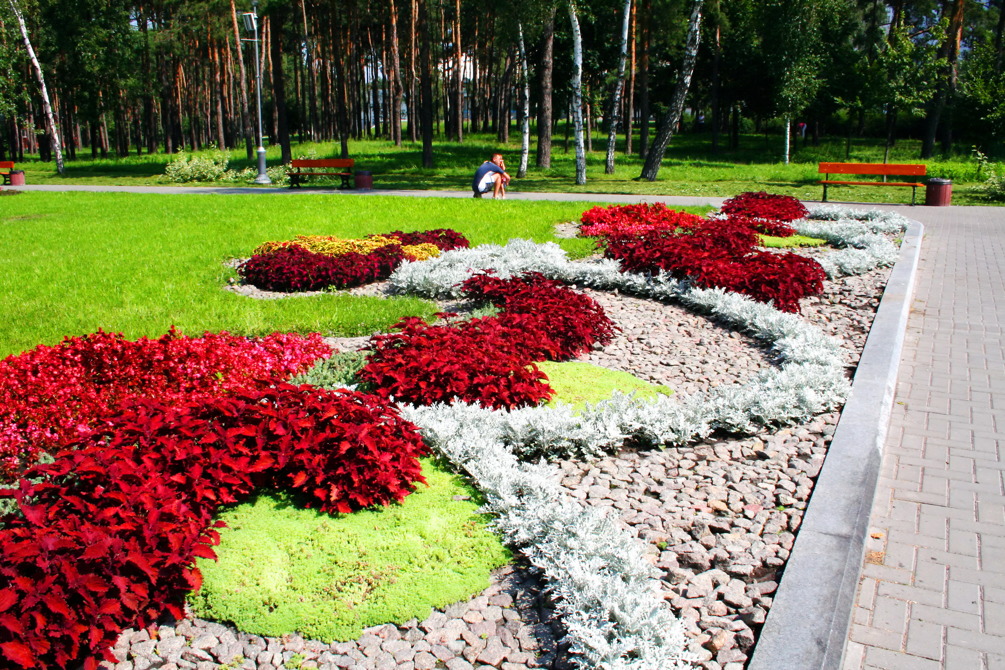 2010 р.